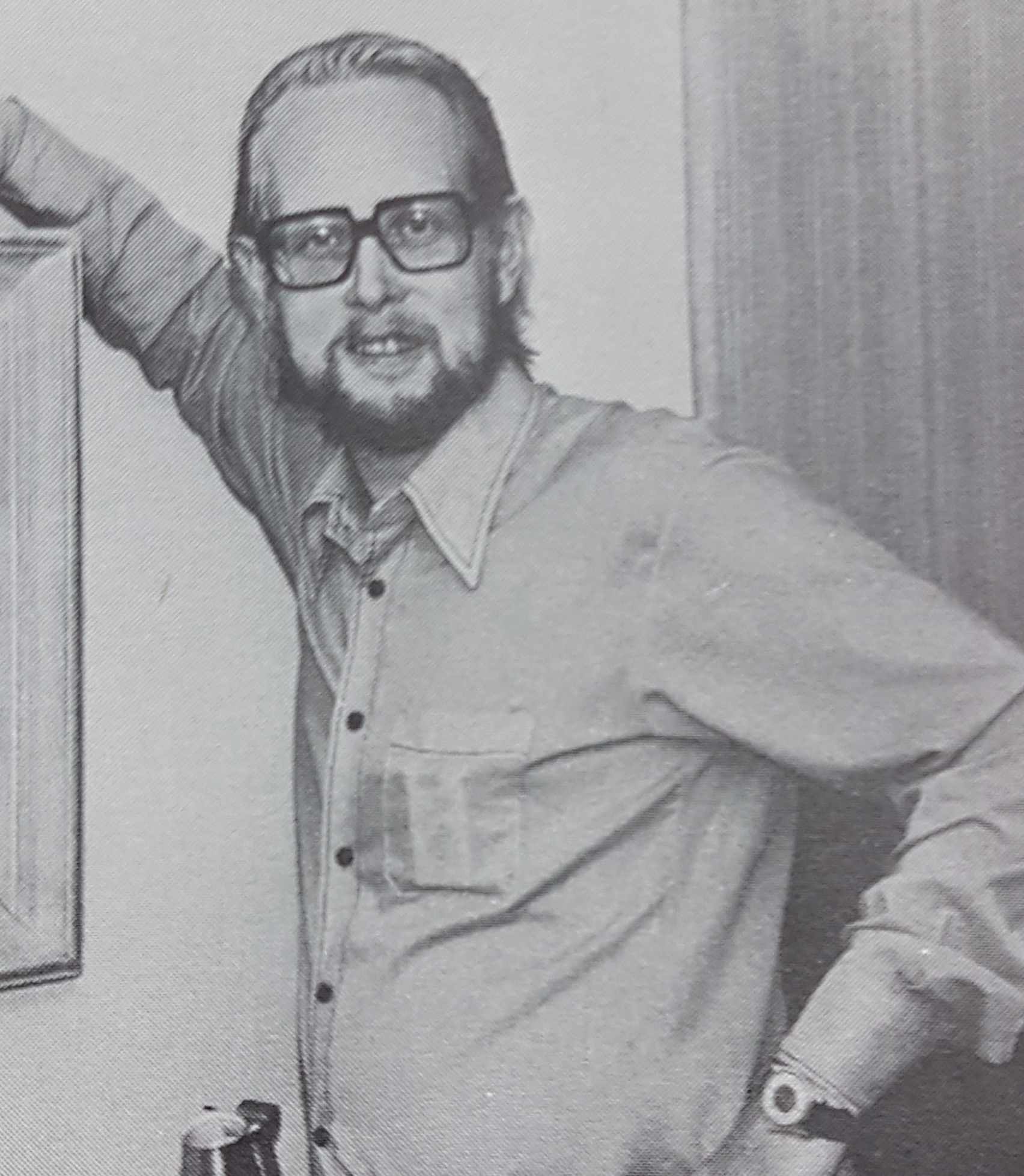 Sven-Erik Skotte Artist from Sweden